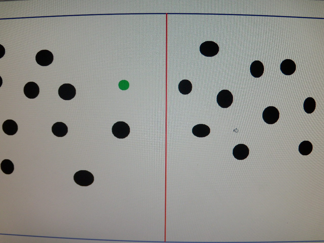 Übersicht des Spielfelds bei Schnurball